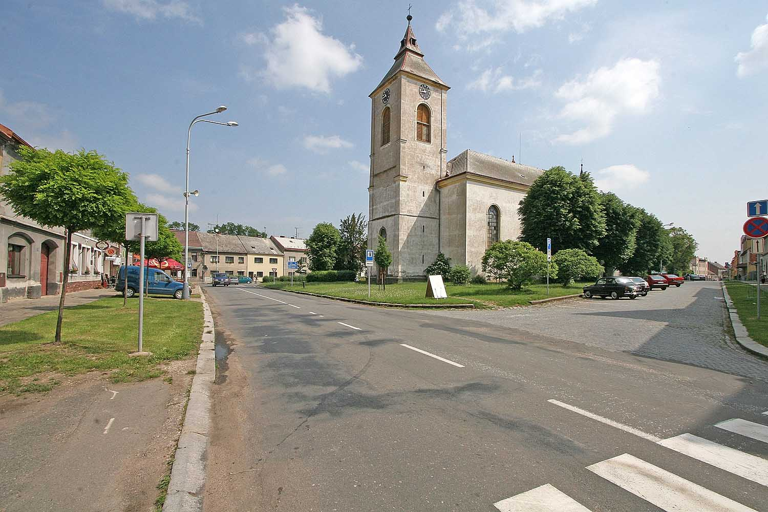 Nechanice - Husovo náměstí